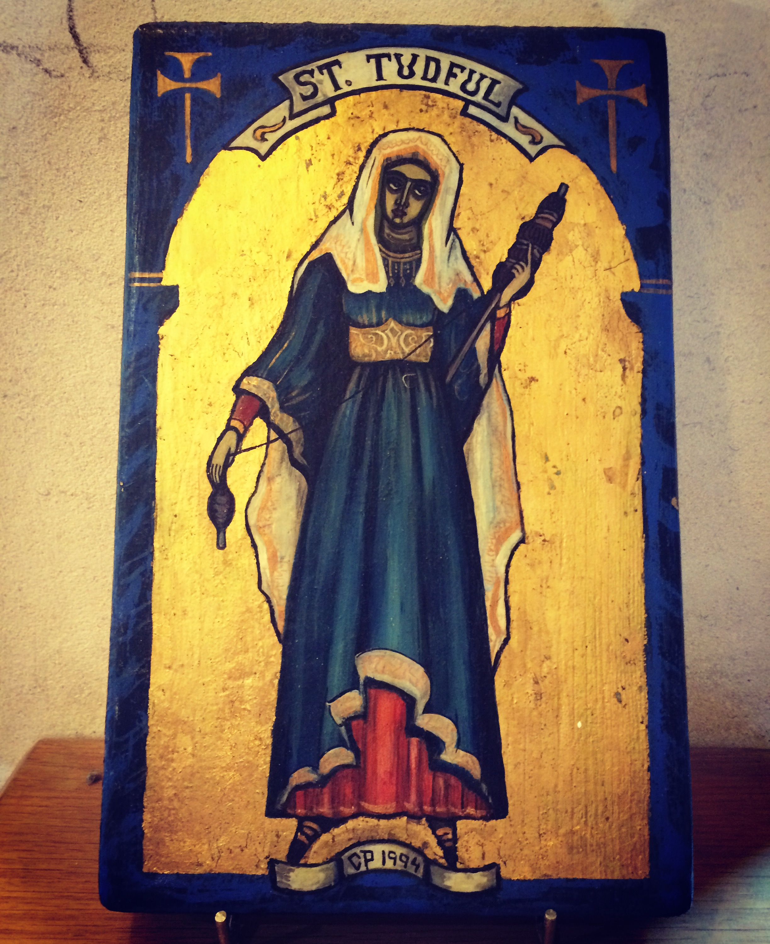 Eicon o Santes Tudful, yn Eglwys Santes Tudful, yng nghanol tref Merthyr.